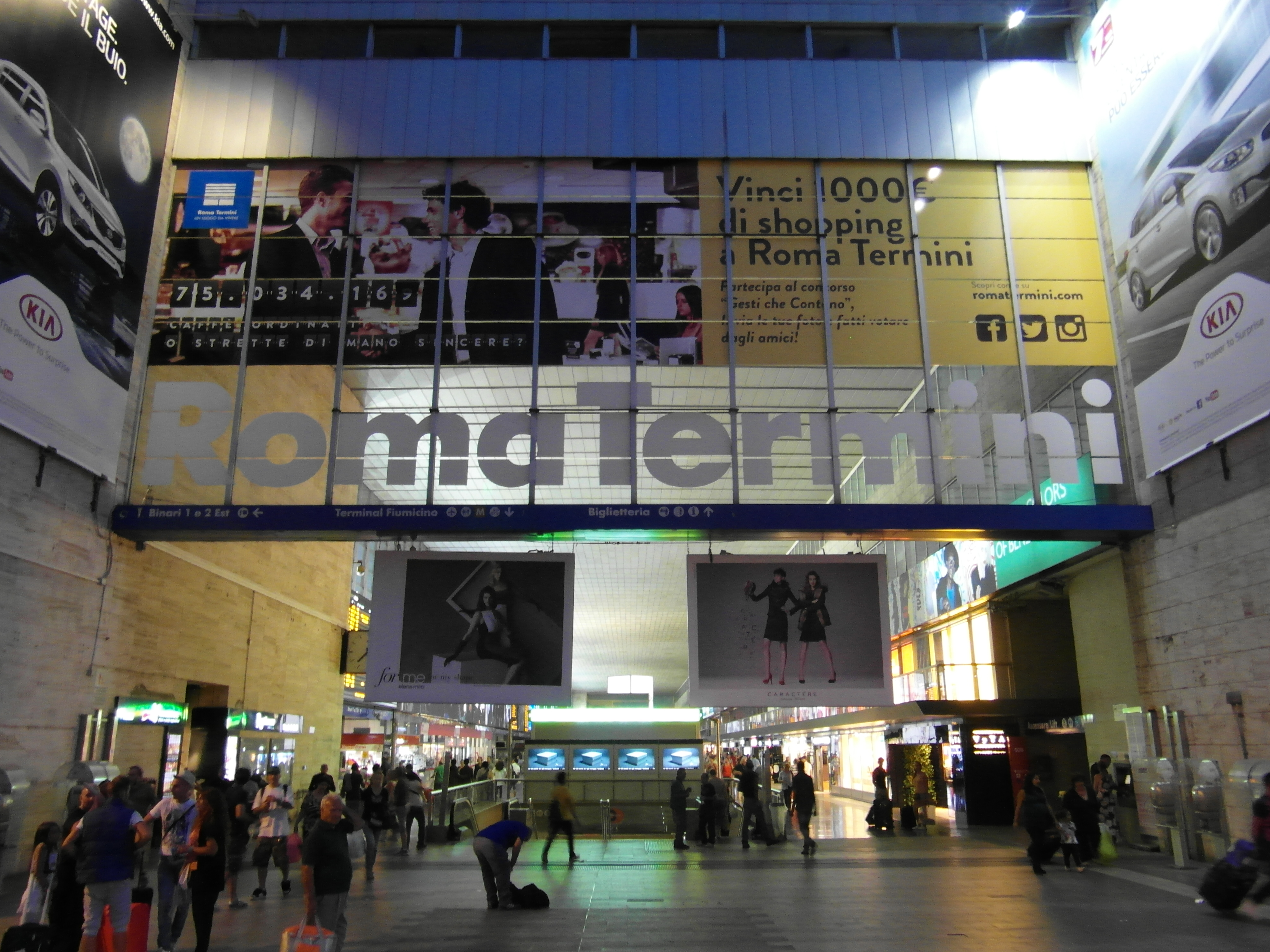 Stazione di Roma Termini Roma Termini railway station Bahnhof Roma Termini